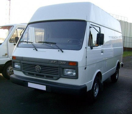 VW LT 35 med ACL motor som sees av de tre ekstra luftinntak i fronten